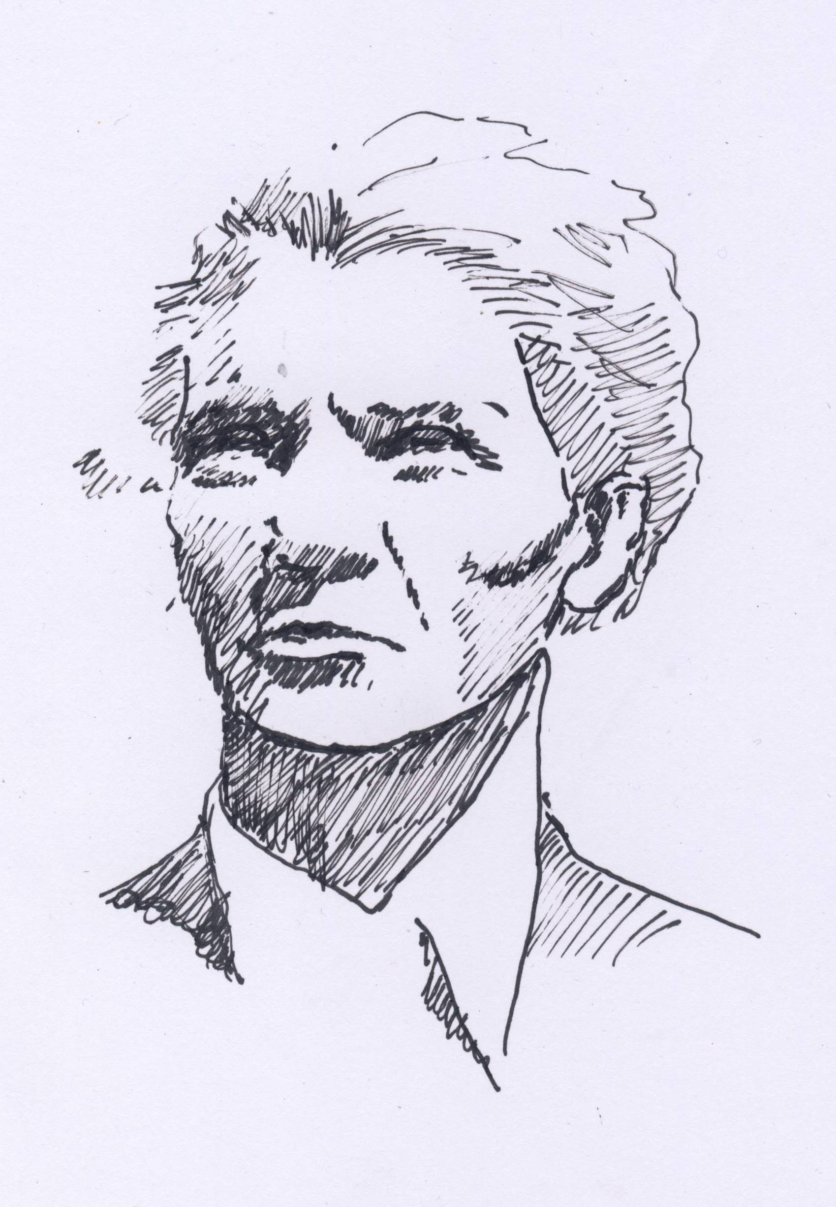 tintelpen